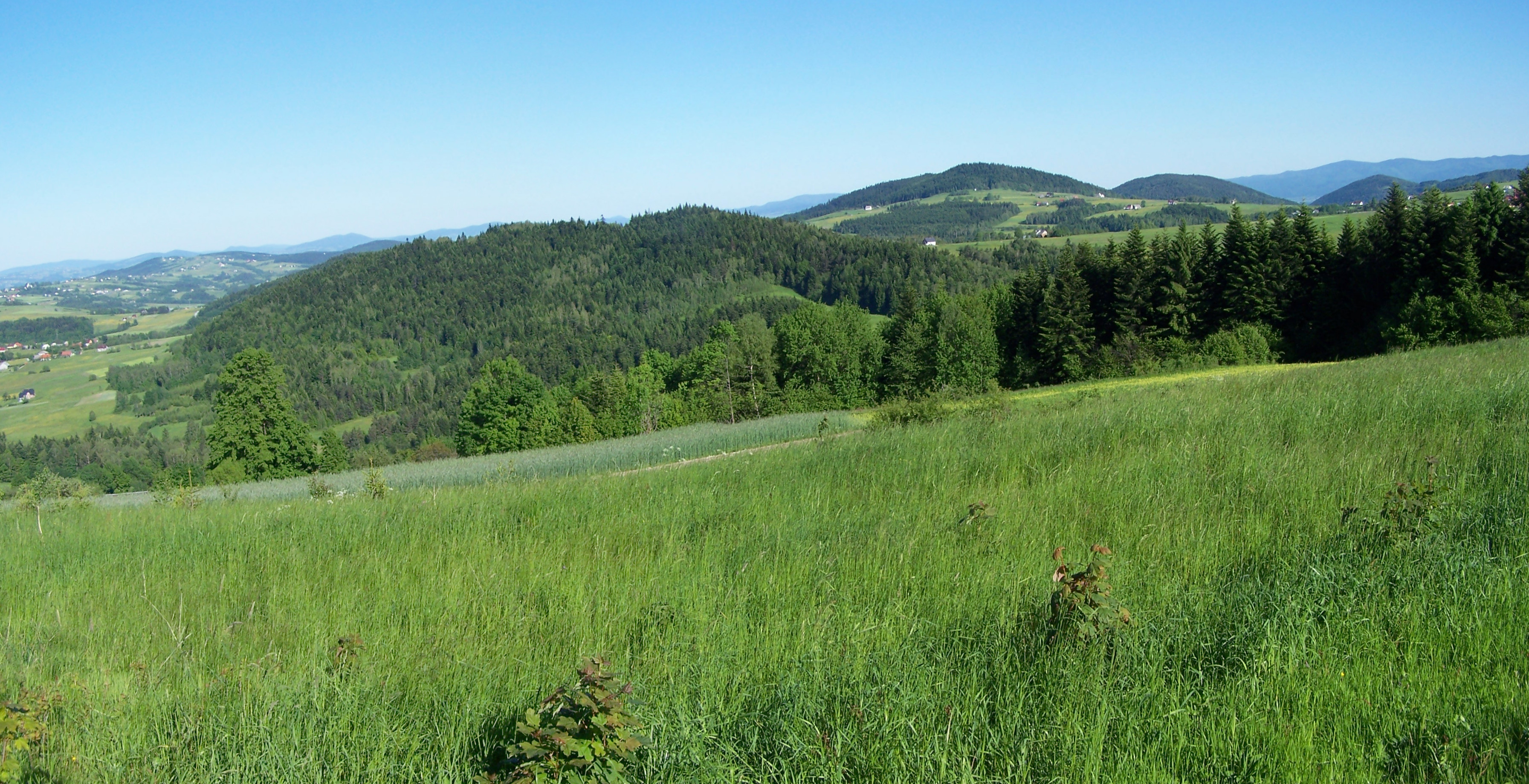 Widok z wschodnich stoków Golcowa. Na pierwszym planie zalesiony Kuklacz, po jego prawej stronie, w głębi Łyżka, Pępówka i Skiełek